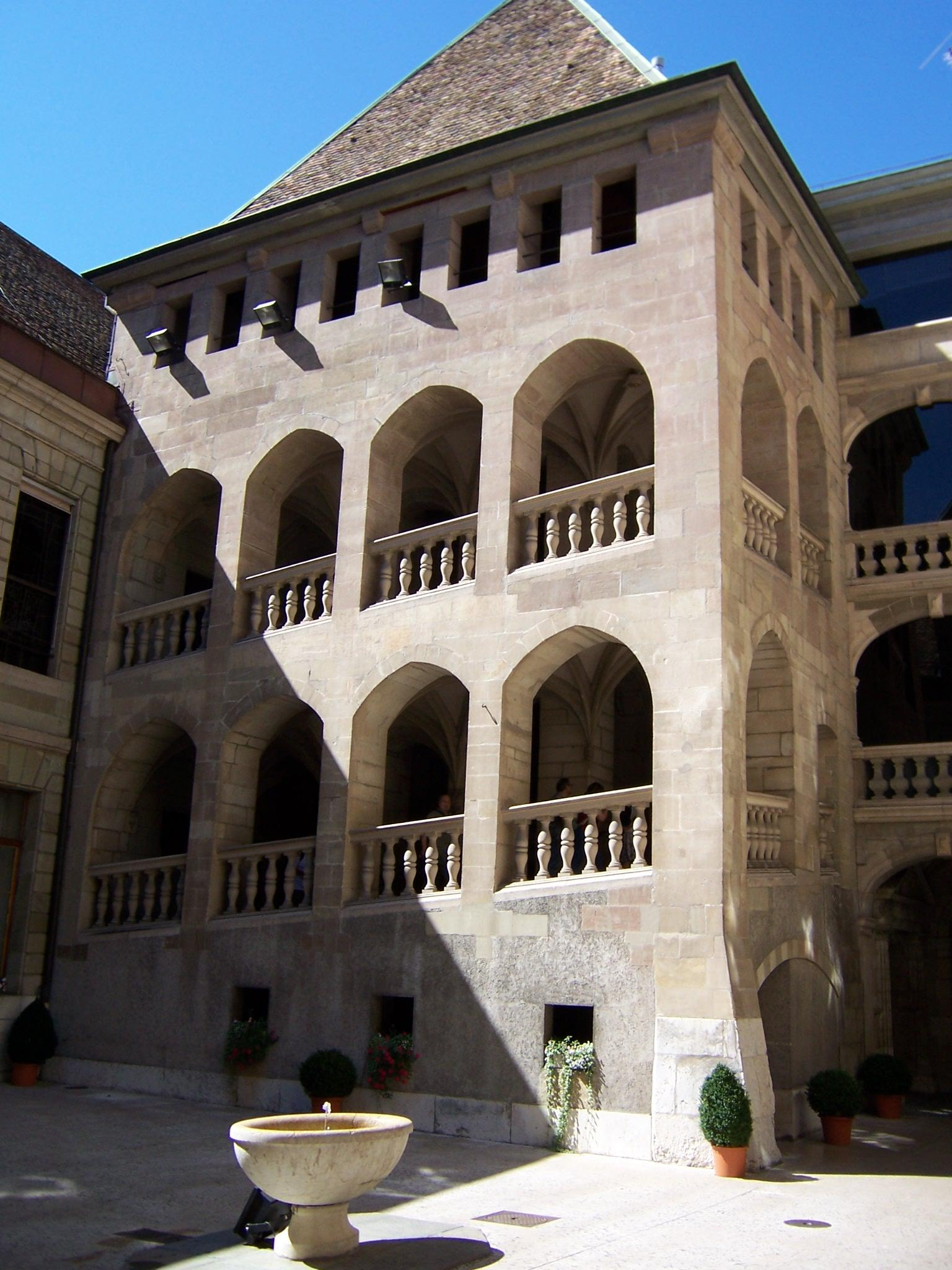 Innenhof des Rathauses von Genf / Genève (Schweiz) eigene Aufnahme vom 3. September 2006